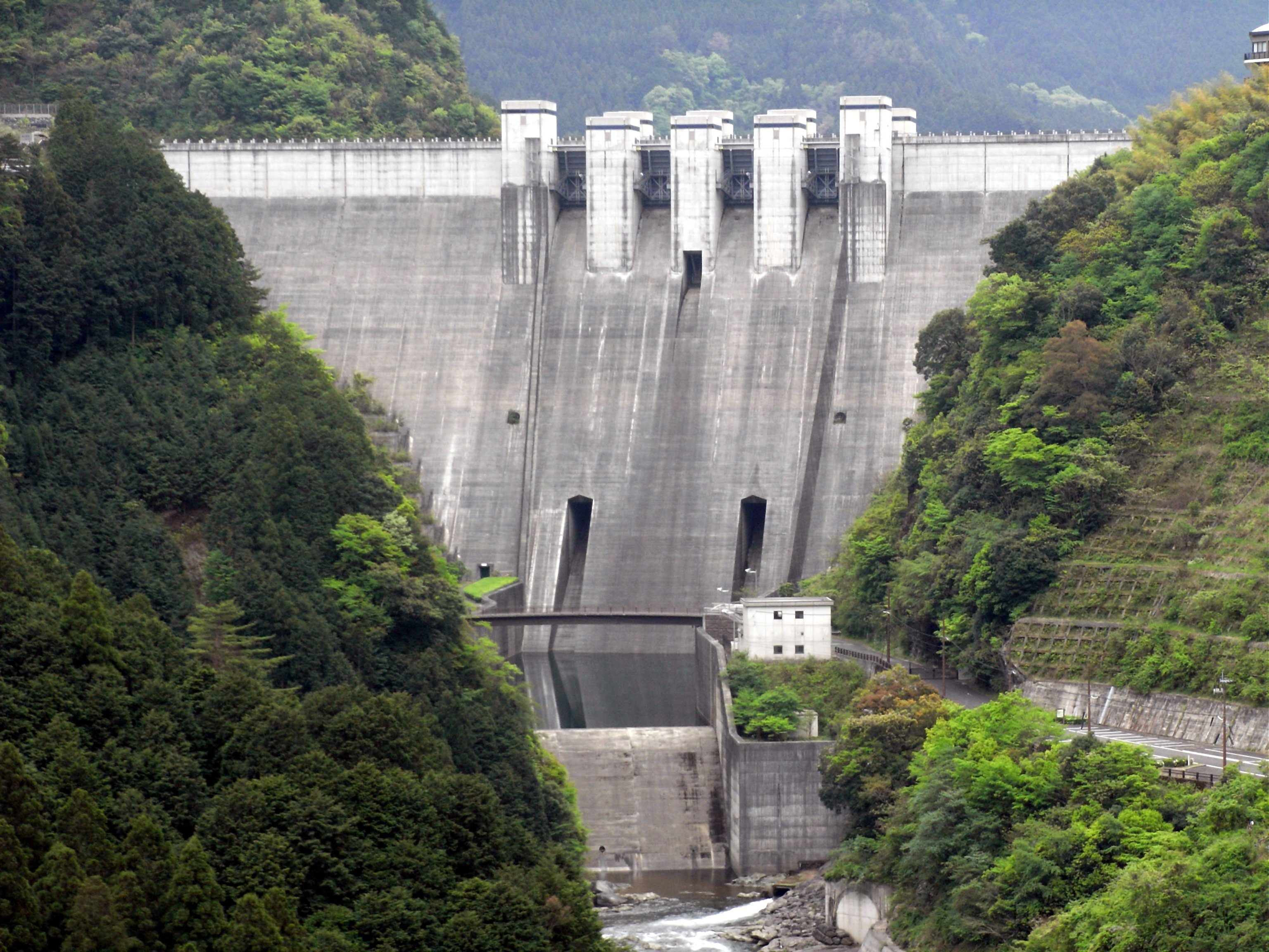 Dam